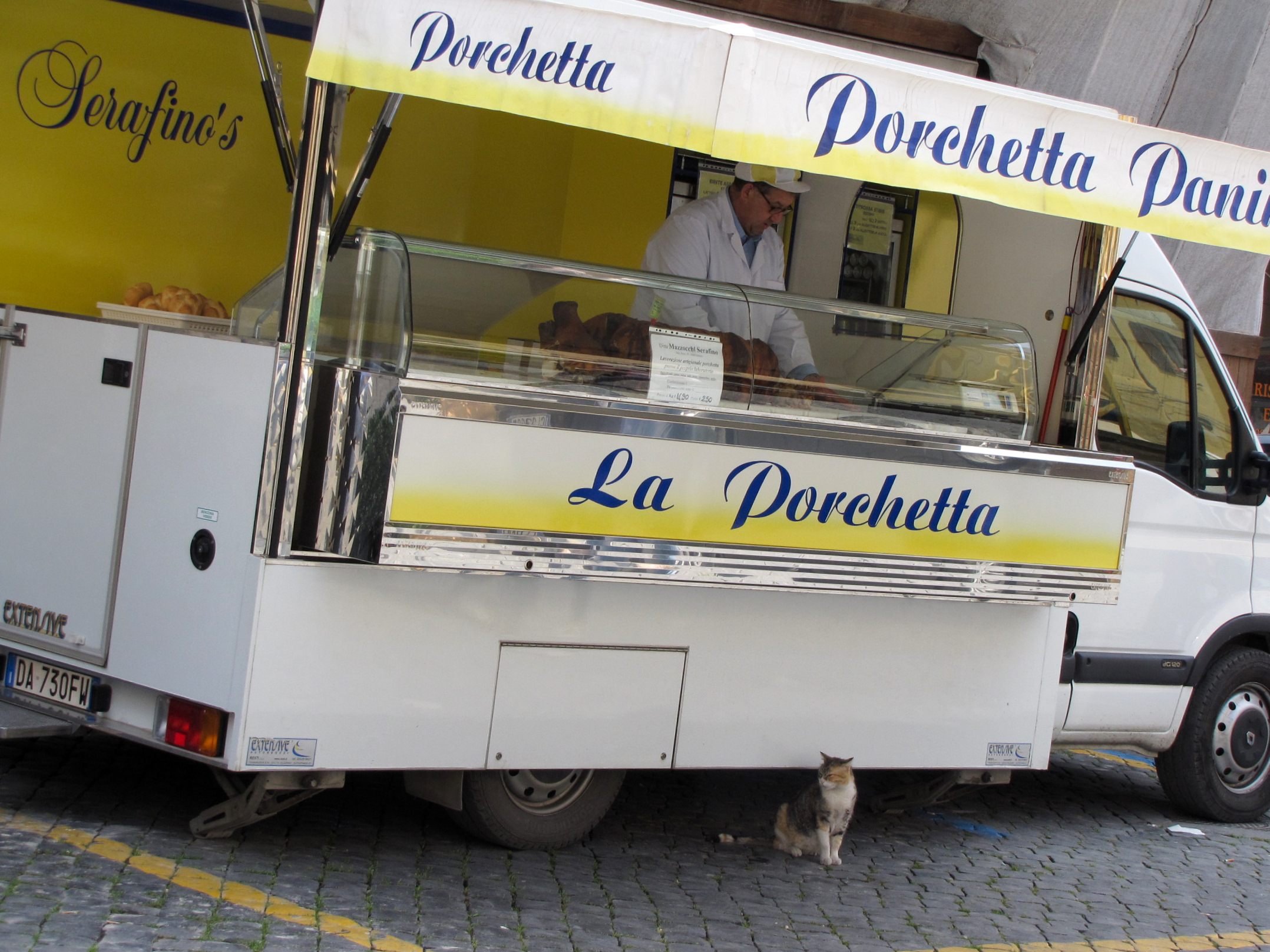 Venditore ambulante di porchetta a Spoleto, Umbria - Italia.